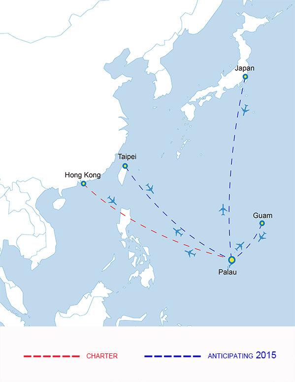 Route network Palau Pacific Airways